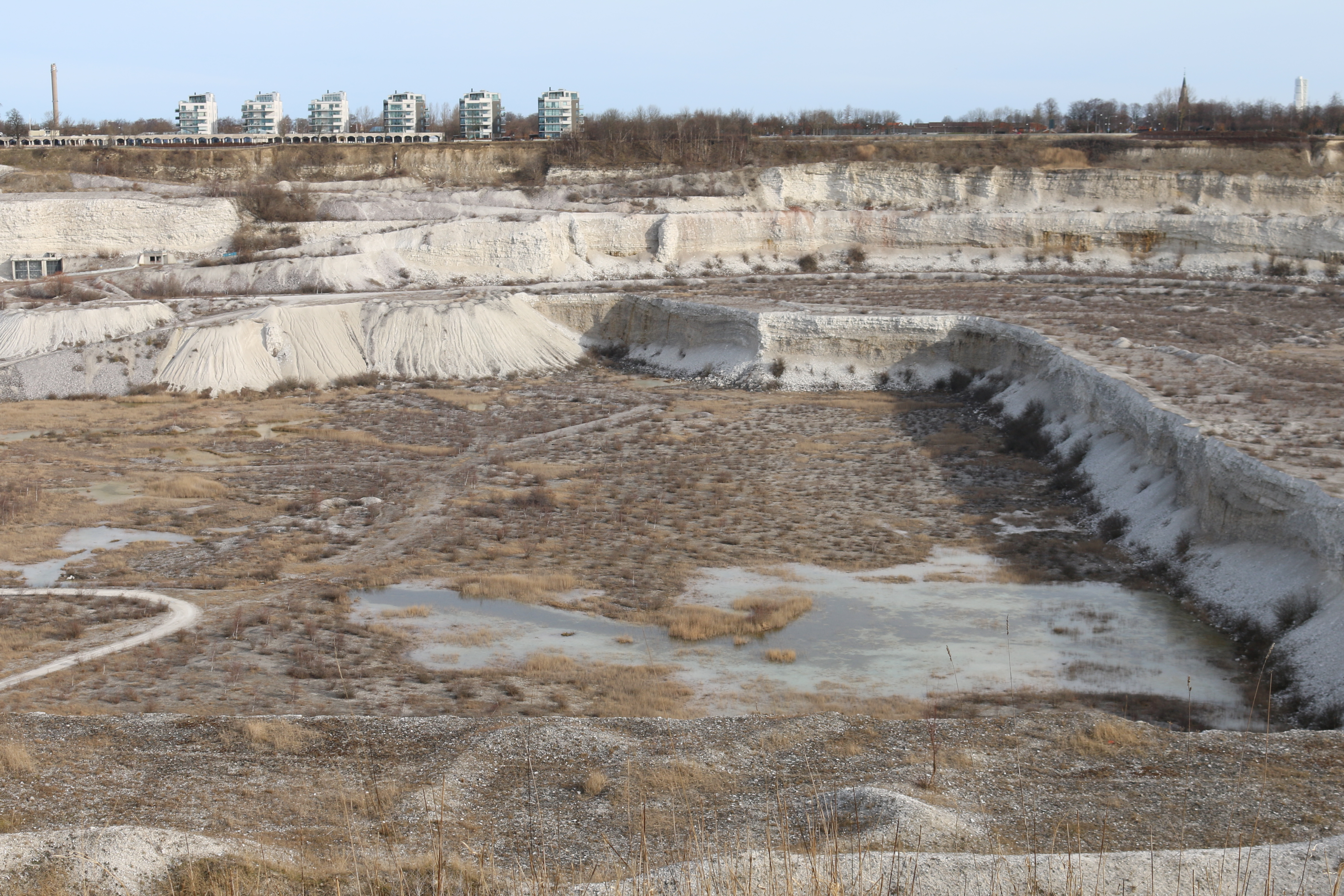 Limhamns kalkbrott i mars 2015